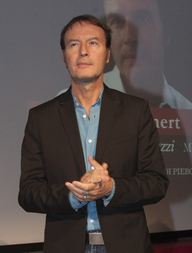 Enrico Remmert, scrittore italiano